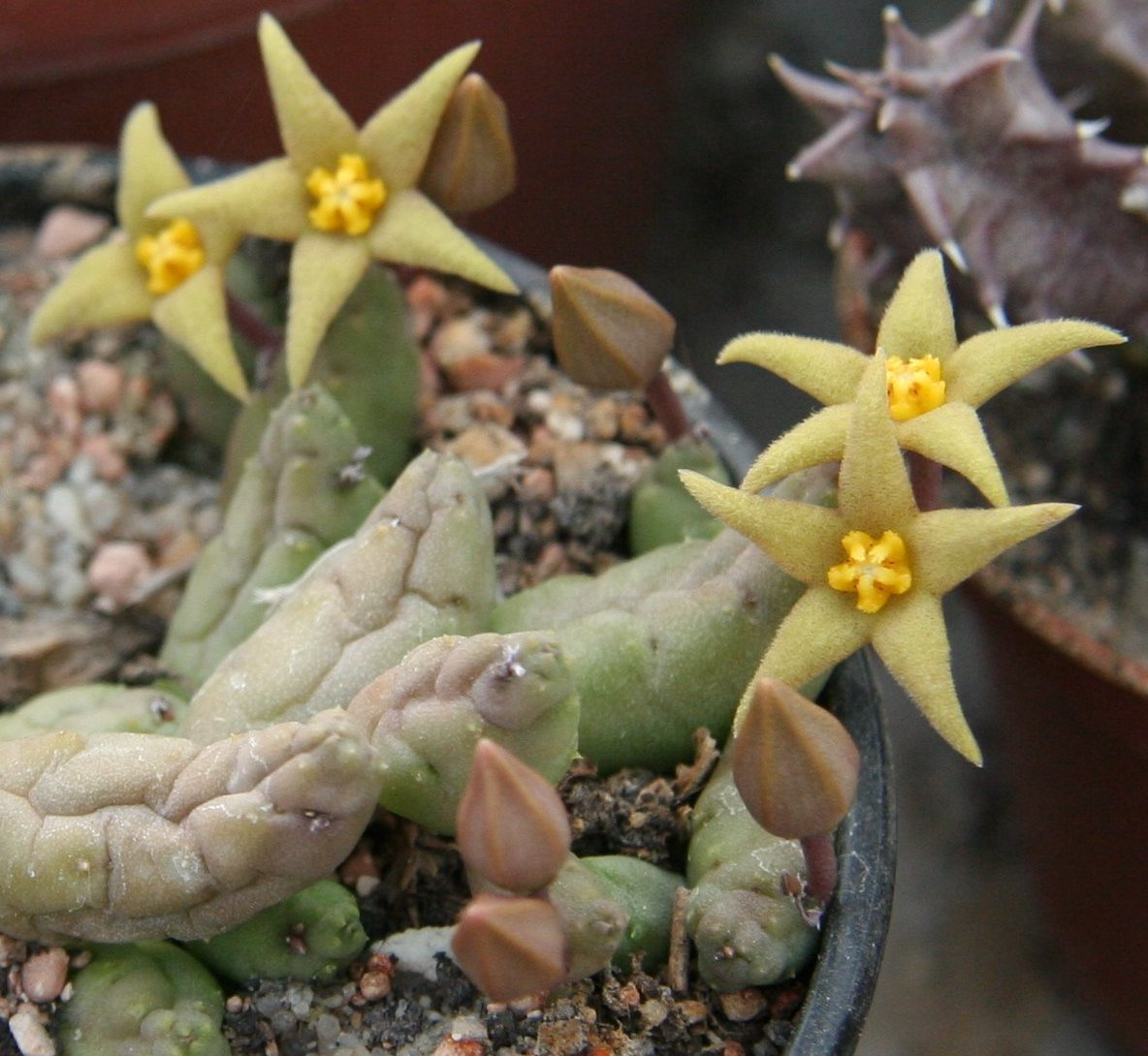 Piaranthus geminatus var. geminatus 'globosus' in Blüte